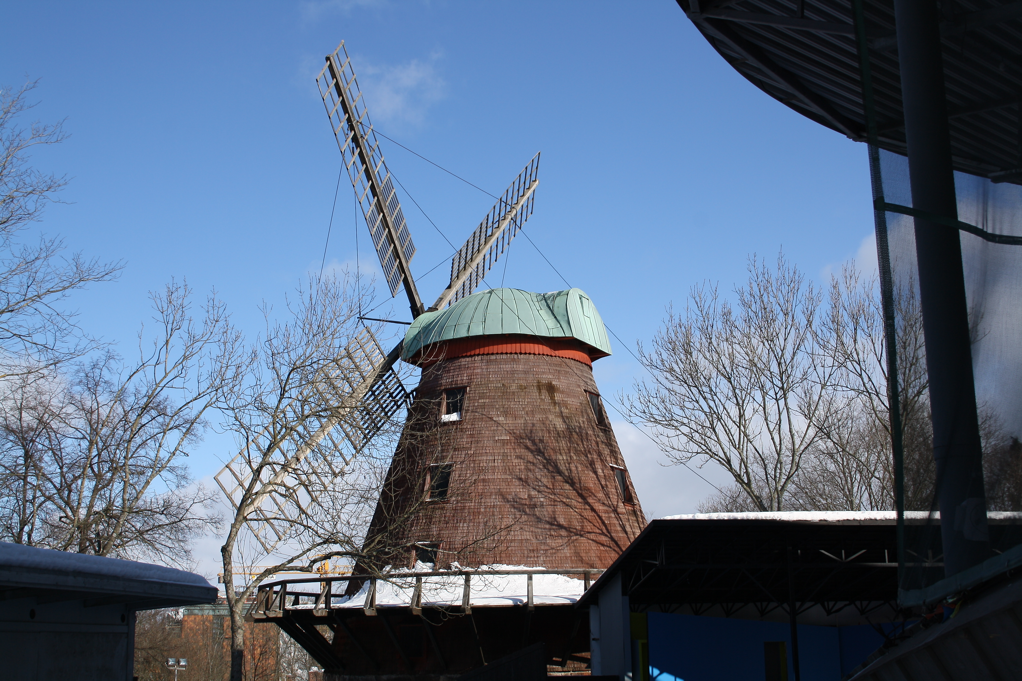 Samppalinnan tuulimylly